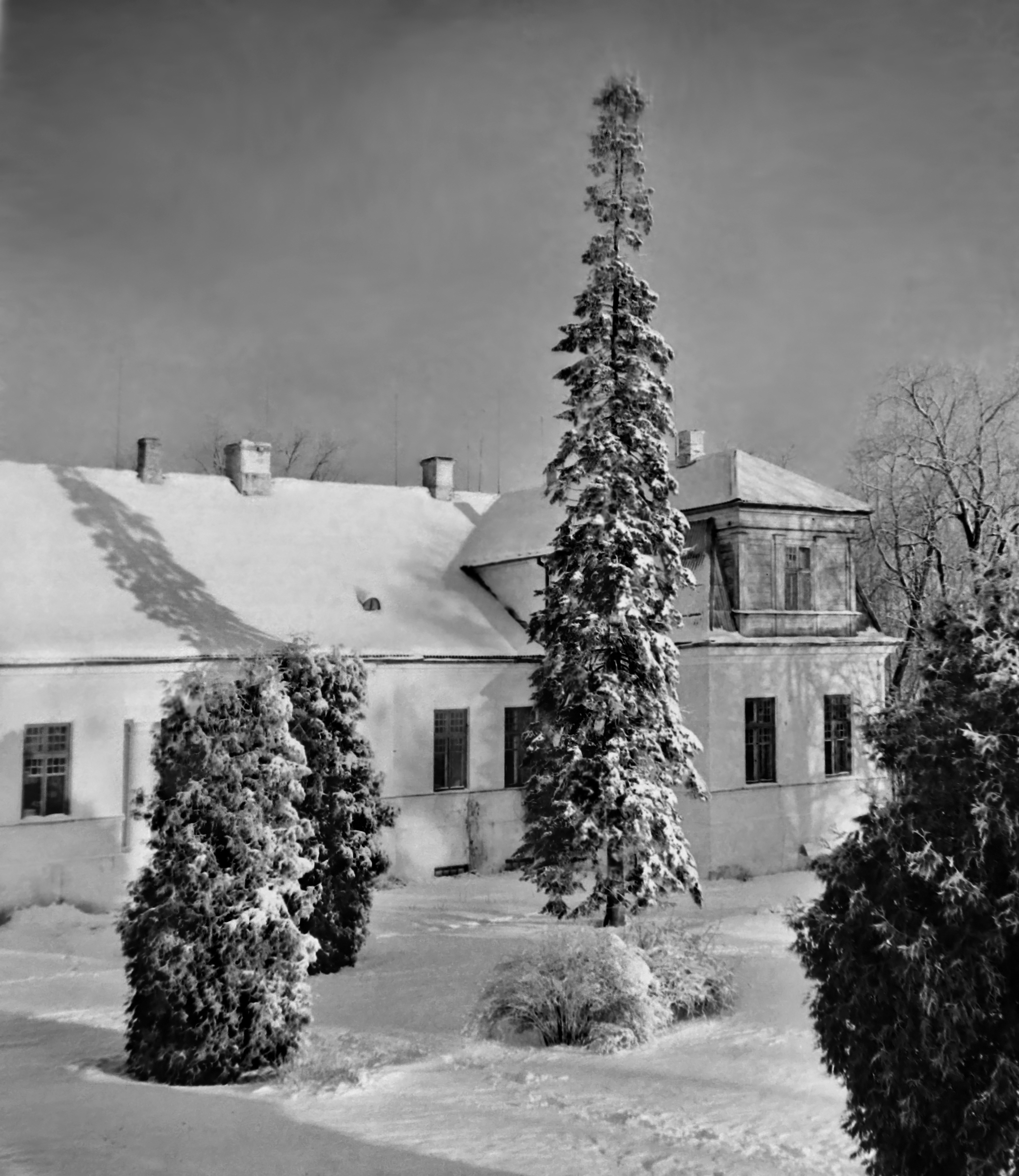 Antsla Sovhoostehnikum 1977 aastal